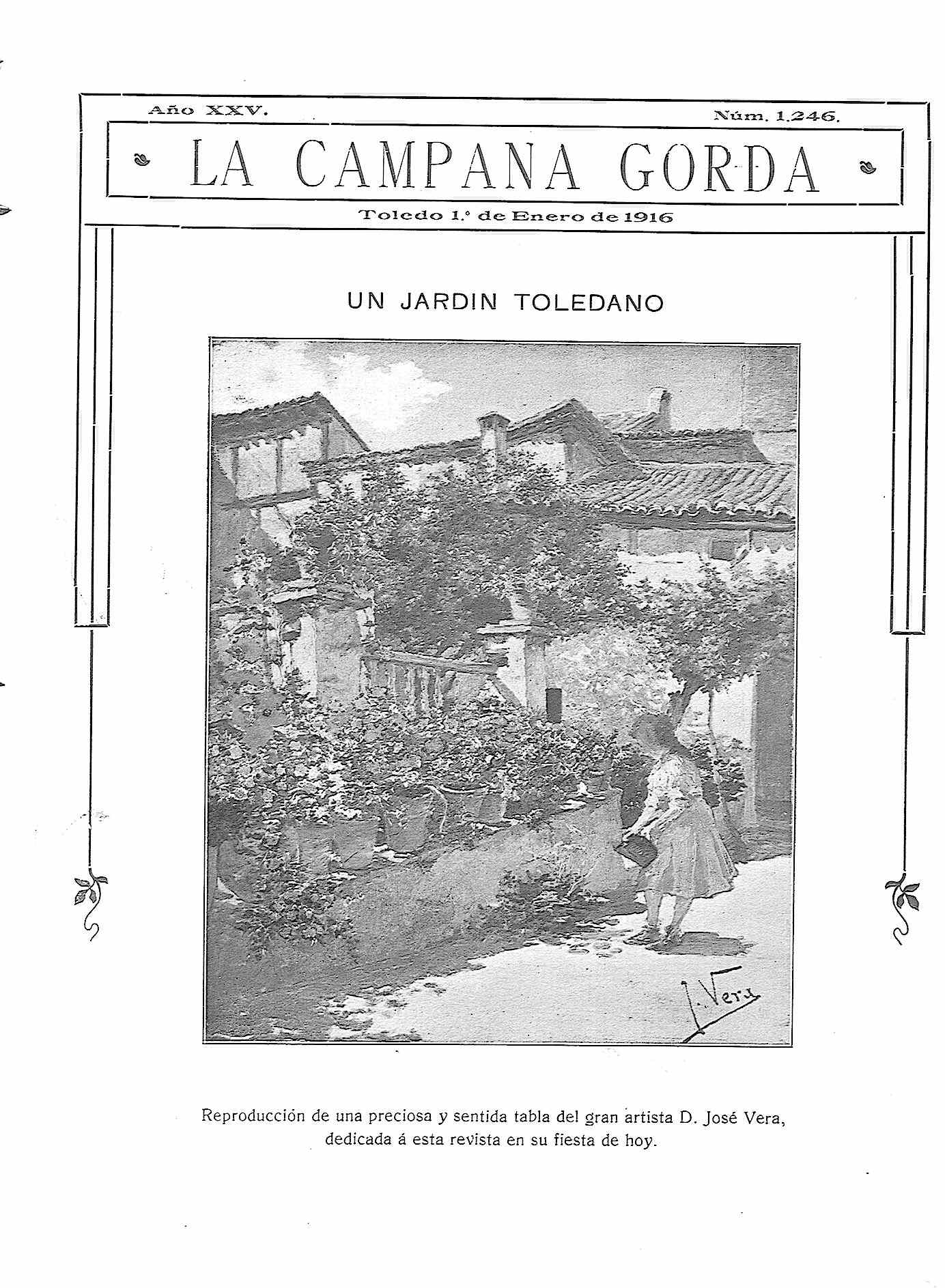 Un jardín toledano.